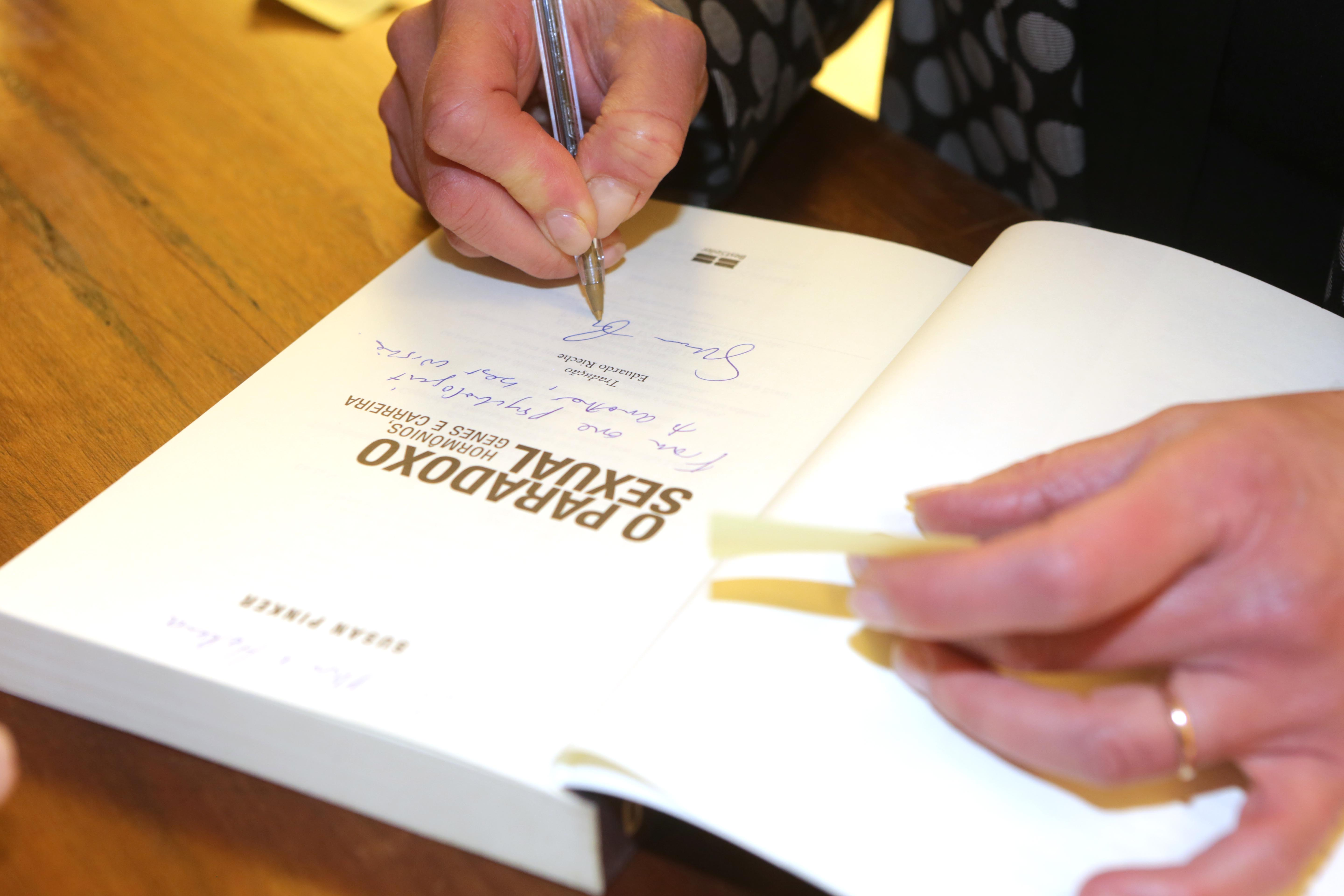 Susan Pinker no Fronteiras do Pensamento São Paulo 2017 Convidada: Susan Pinker, psicóloga canadense Data: 06 de dezembro de 2017 Local: Teatro Santander Crédito das imagens: Fronteiras do Pensamento / Greg Salibian